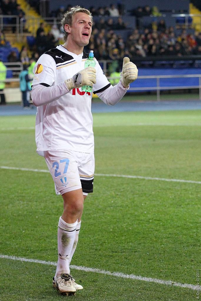 Johan Dahlin, goalkeeper in Malmö FF